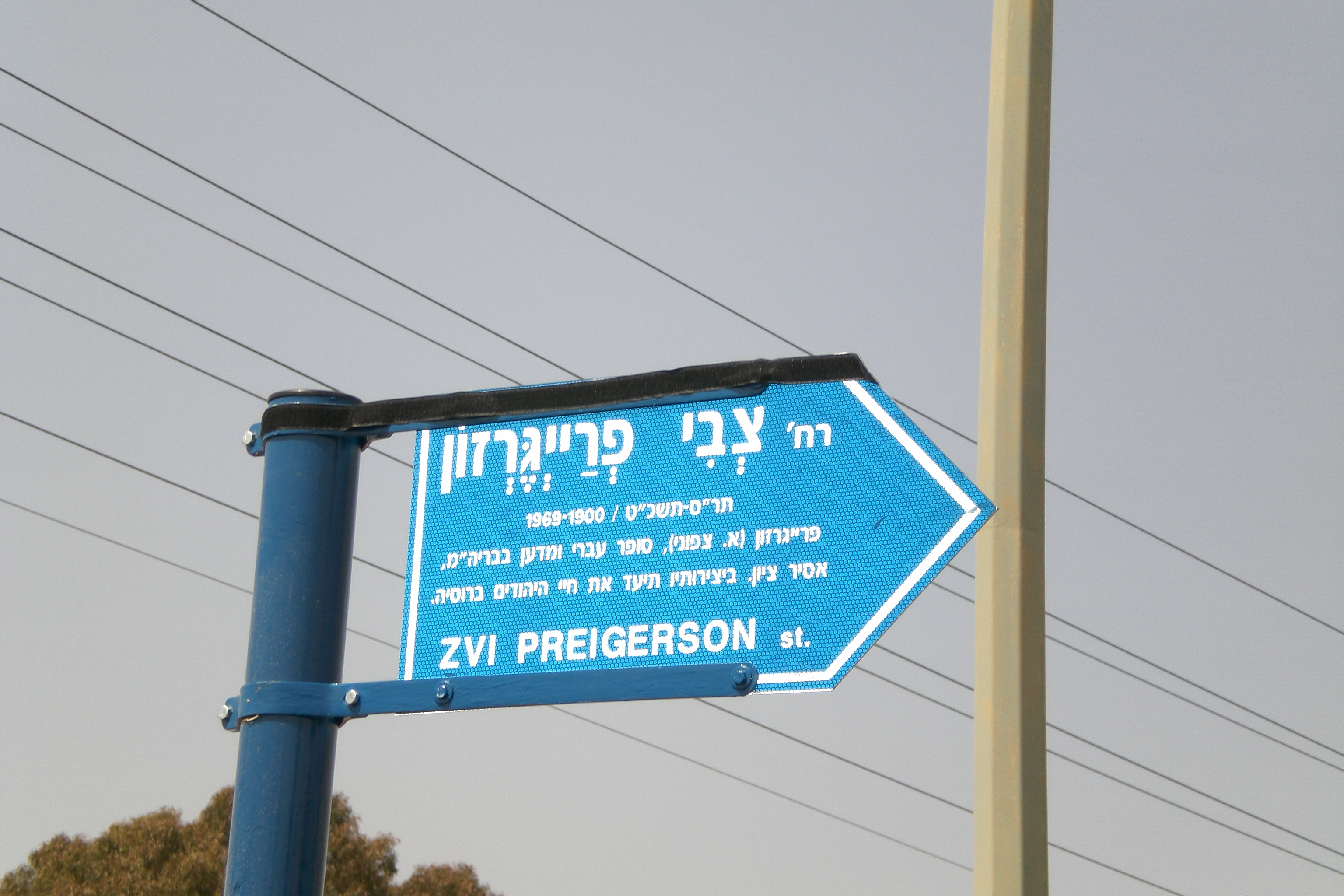 שלט רחוב צבי פרייגרזון בתל אטביב